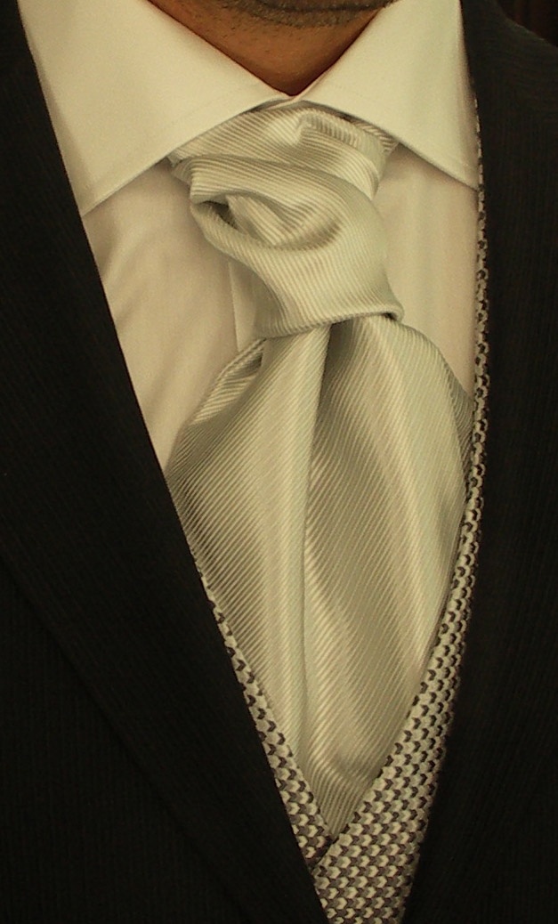 Corbatón de microfribra.